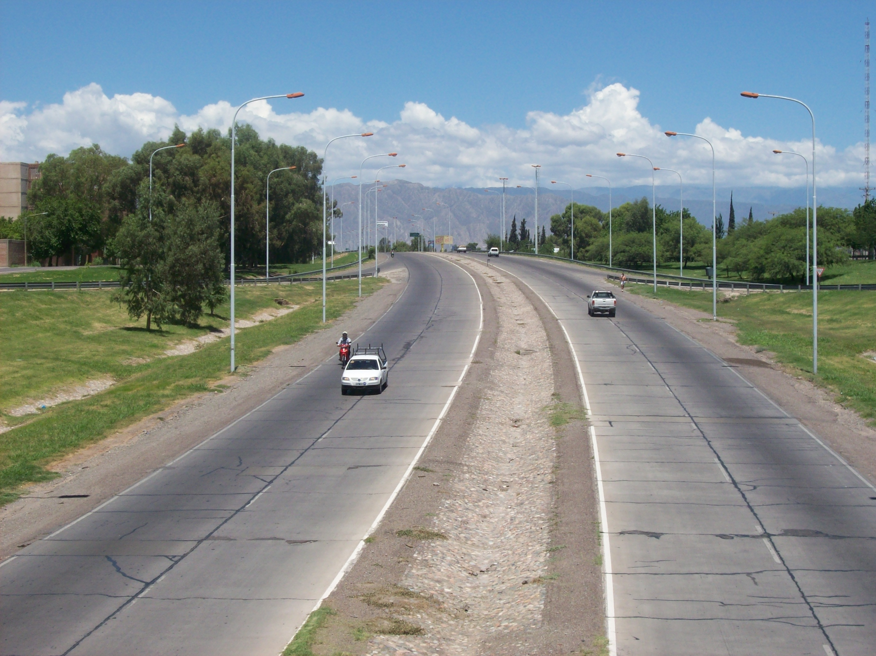 Ruta Nacional A014, más conocida como Avenida de Circunvalación de la ciudad de San Juan, Argentina. Imagen tomada desde el puente de la Avenida Mendoza Norte.